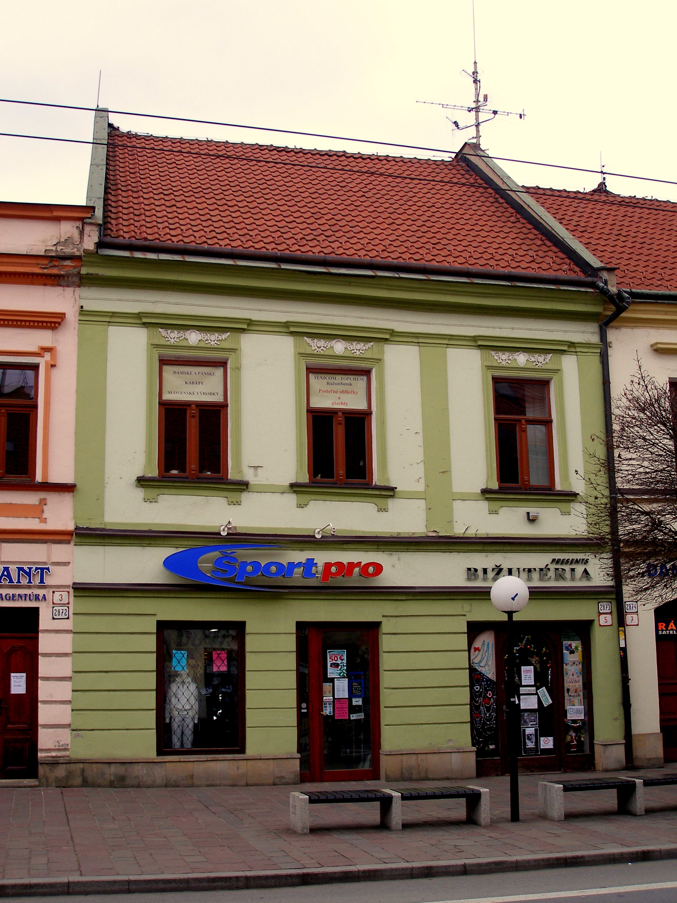 Ulica Hlavná v meste Prešov